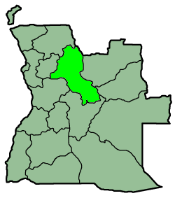 A map from province Malanje, Angola